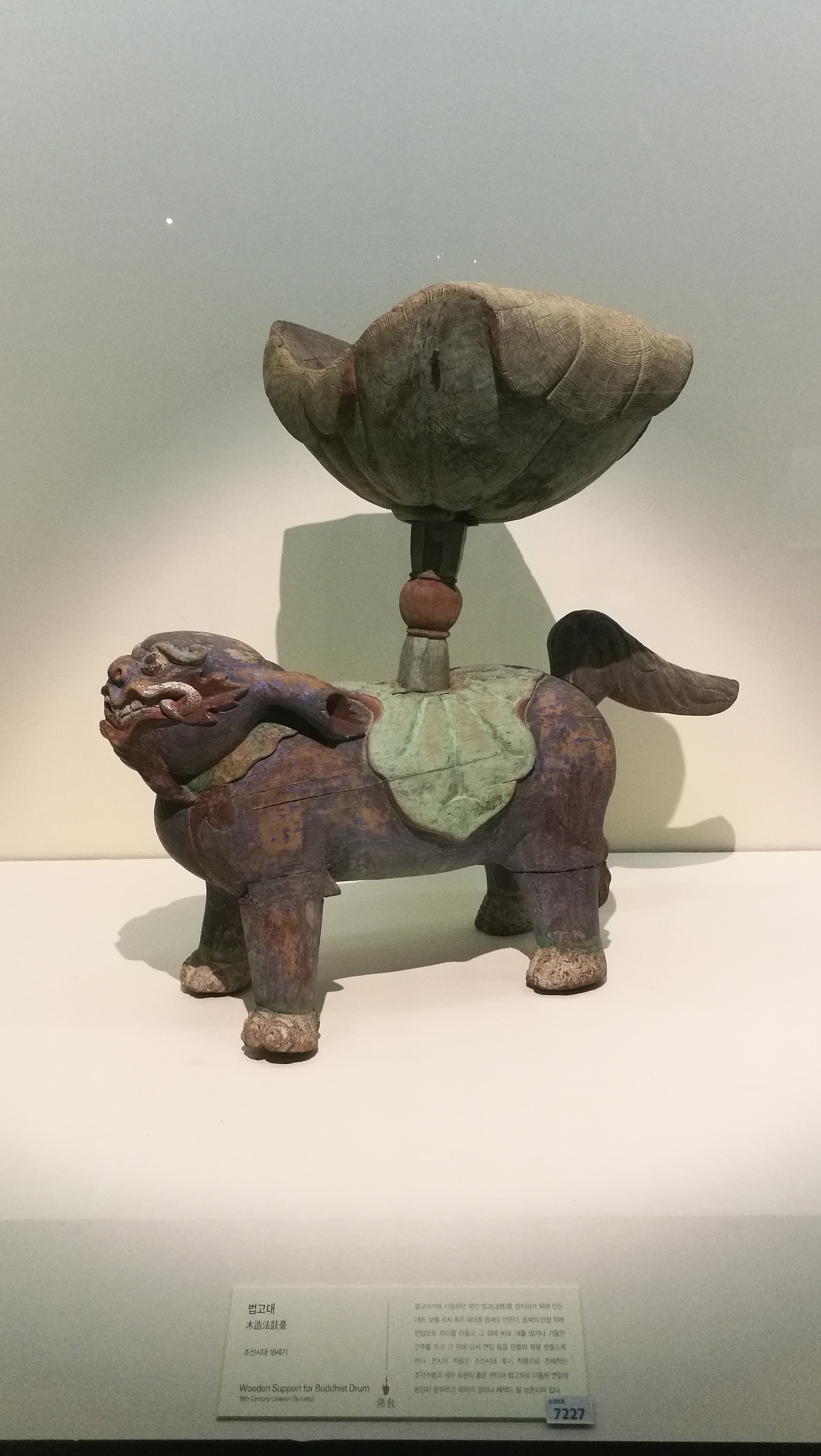 조선시대 18세기 불교 의식에 사용되던 법고를 설치하기 위한 대좌. (경기도 박물관 소장)